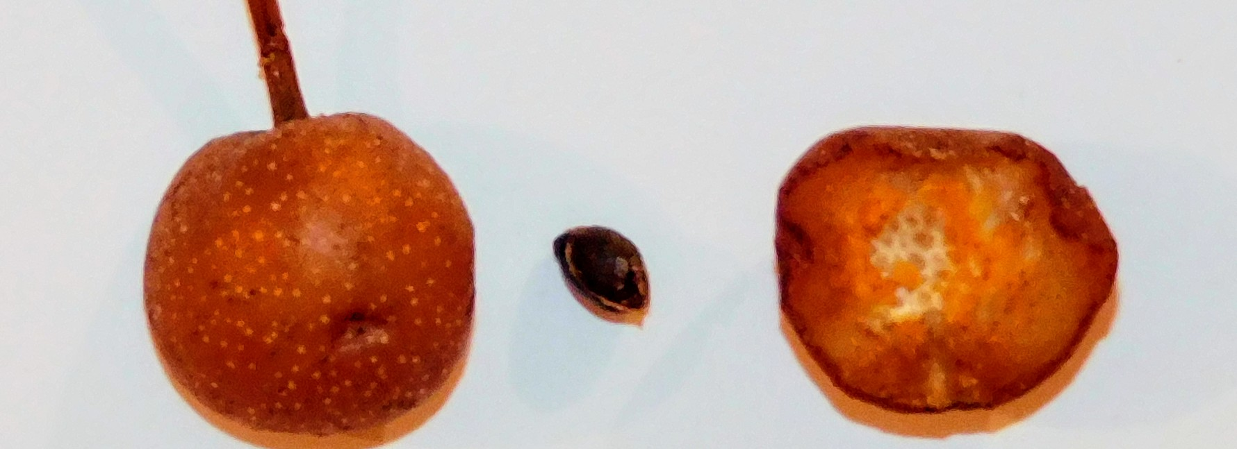 Fruit et pépins du Poirier de Chine Pyrus calleryana d'Ivry sur Seine